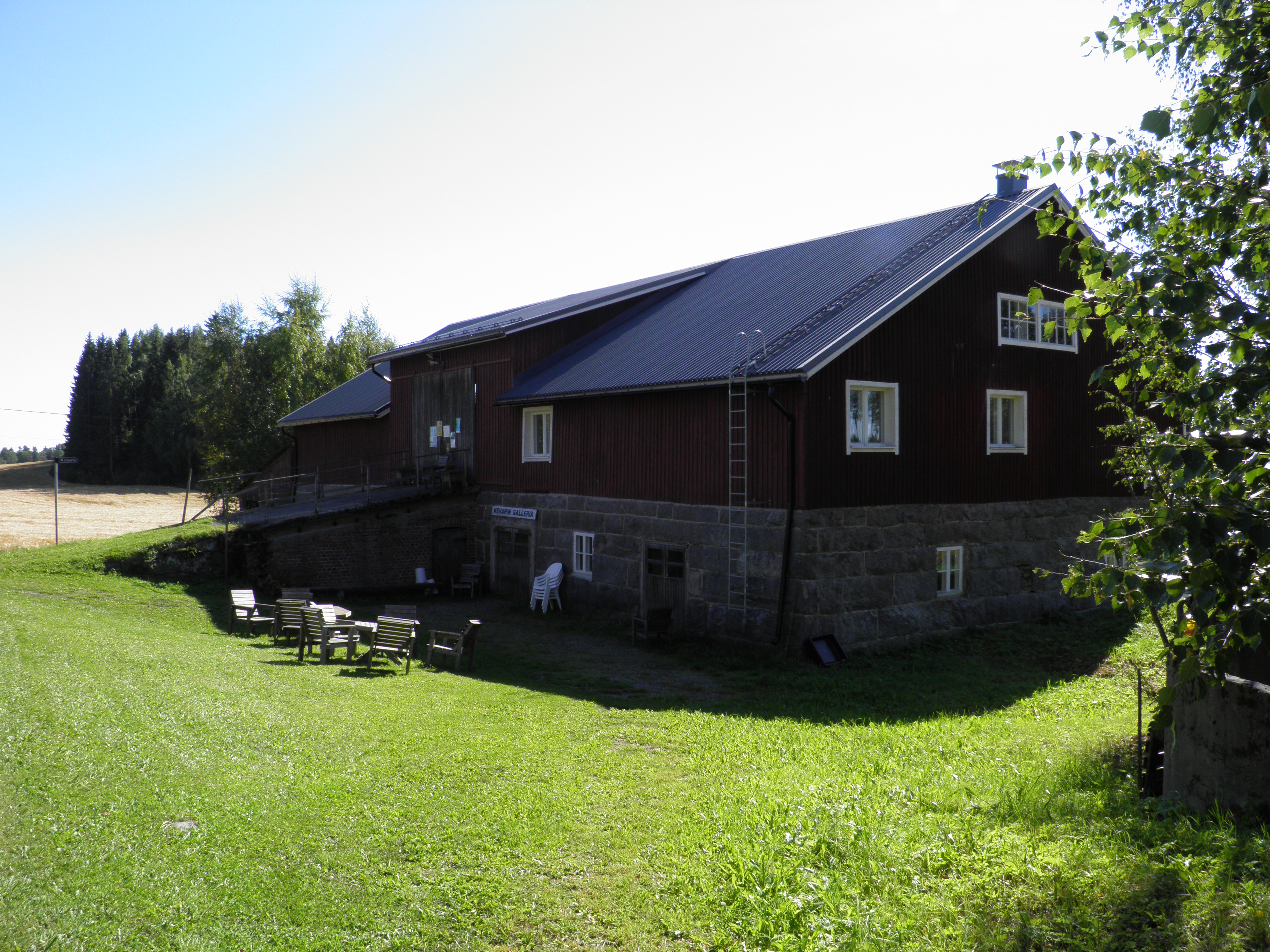 Putulan kirjasto Hämeenkoskella.